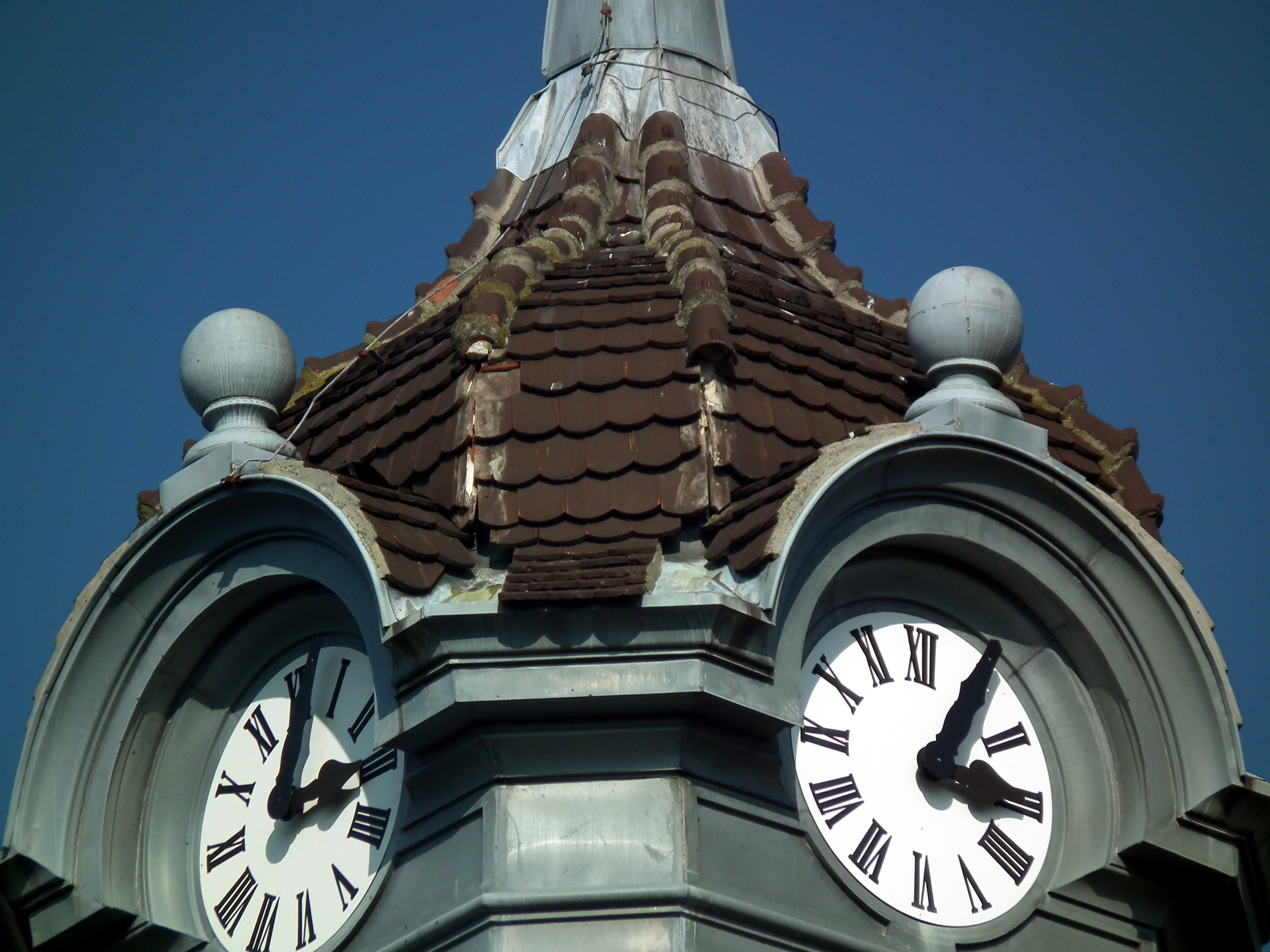 Gymnasium Dresden-Plauen, Uhrenturm, Dachschaden